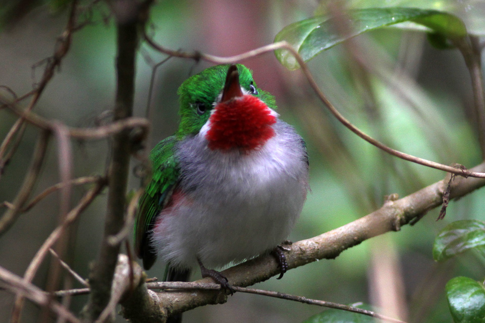 Sierra Baerucu National Park Upper reaches